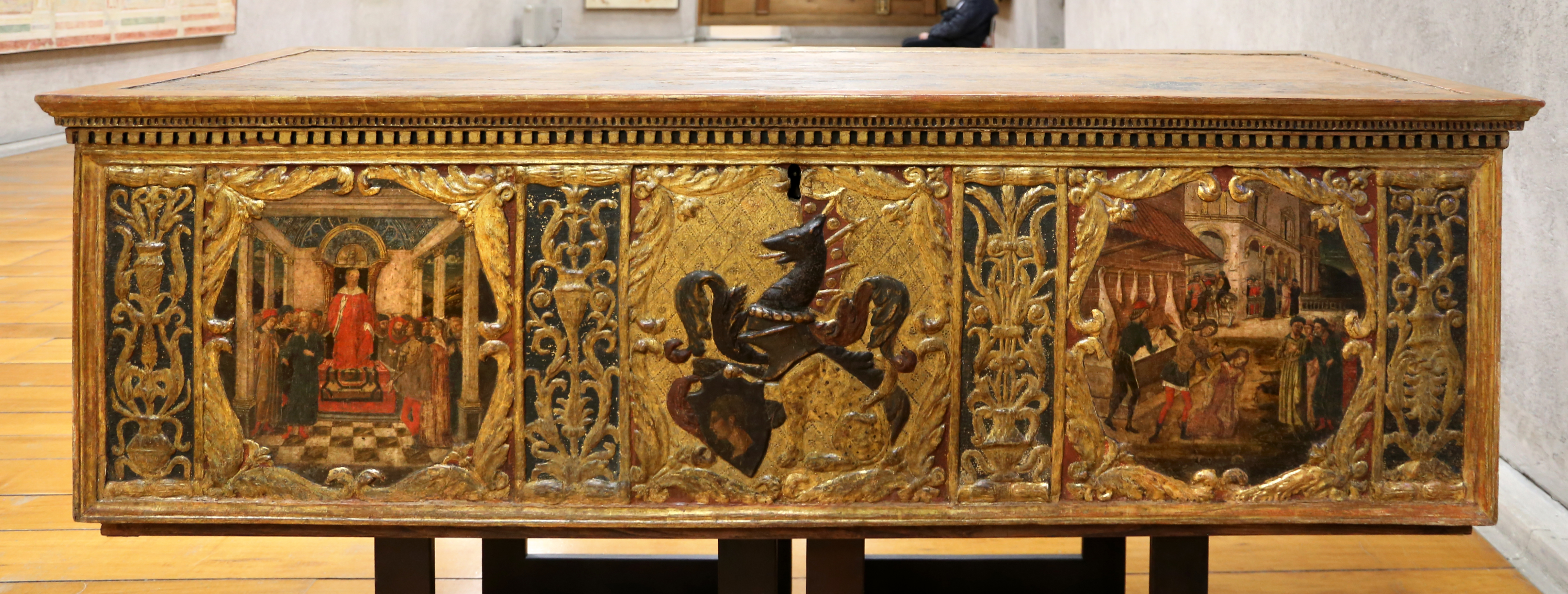 Museo di Castelvecchio This is a photo of a monument which is part of cultural heritage of Italy.